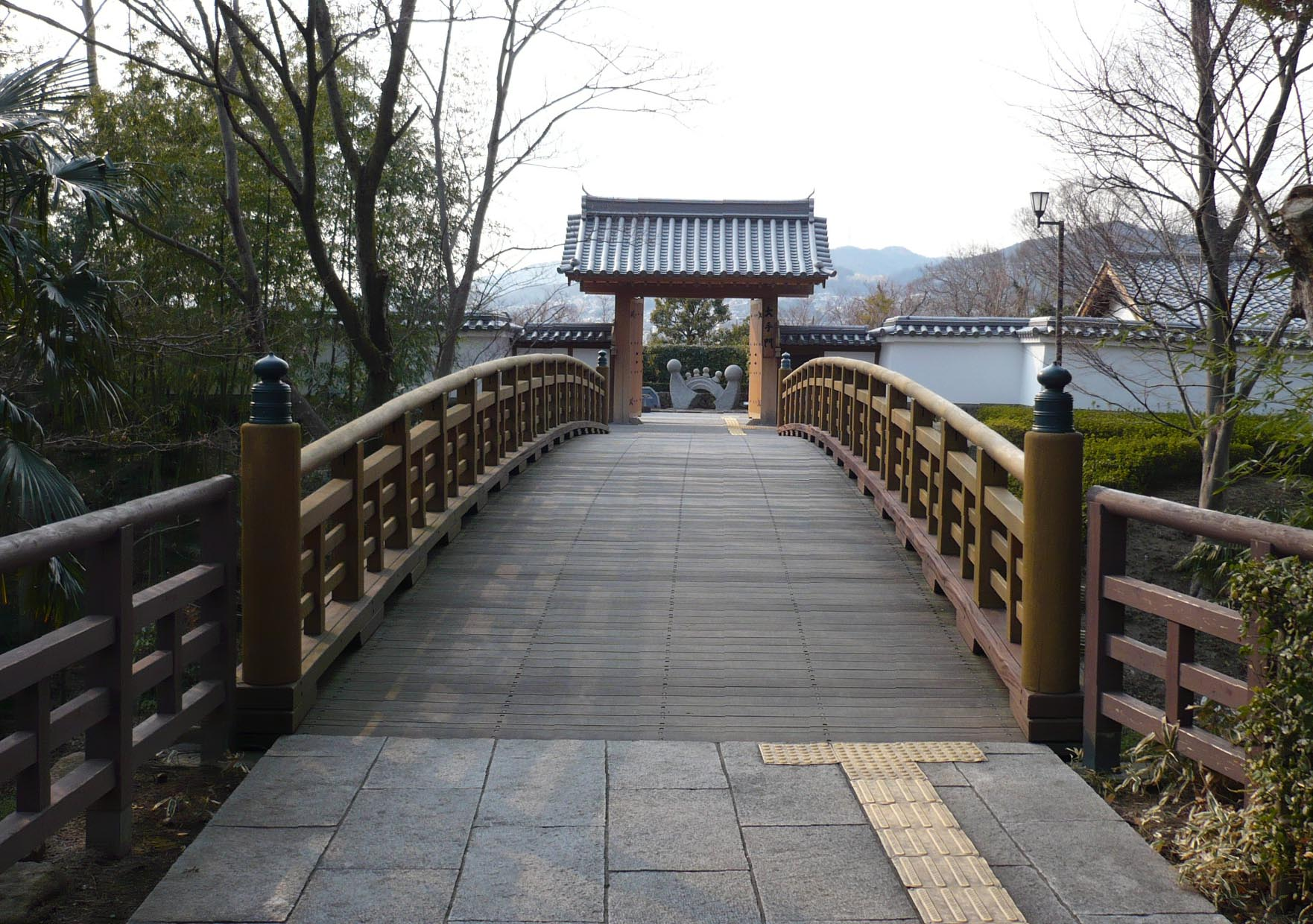 池田城の模擬大手門